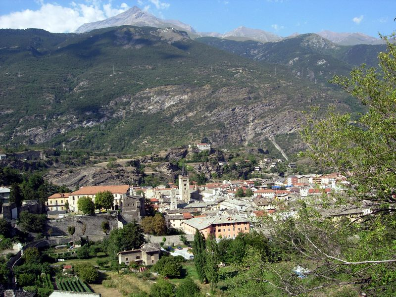 Ville de Suse (Susa), Italie